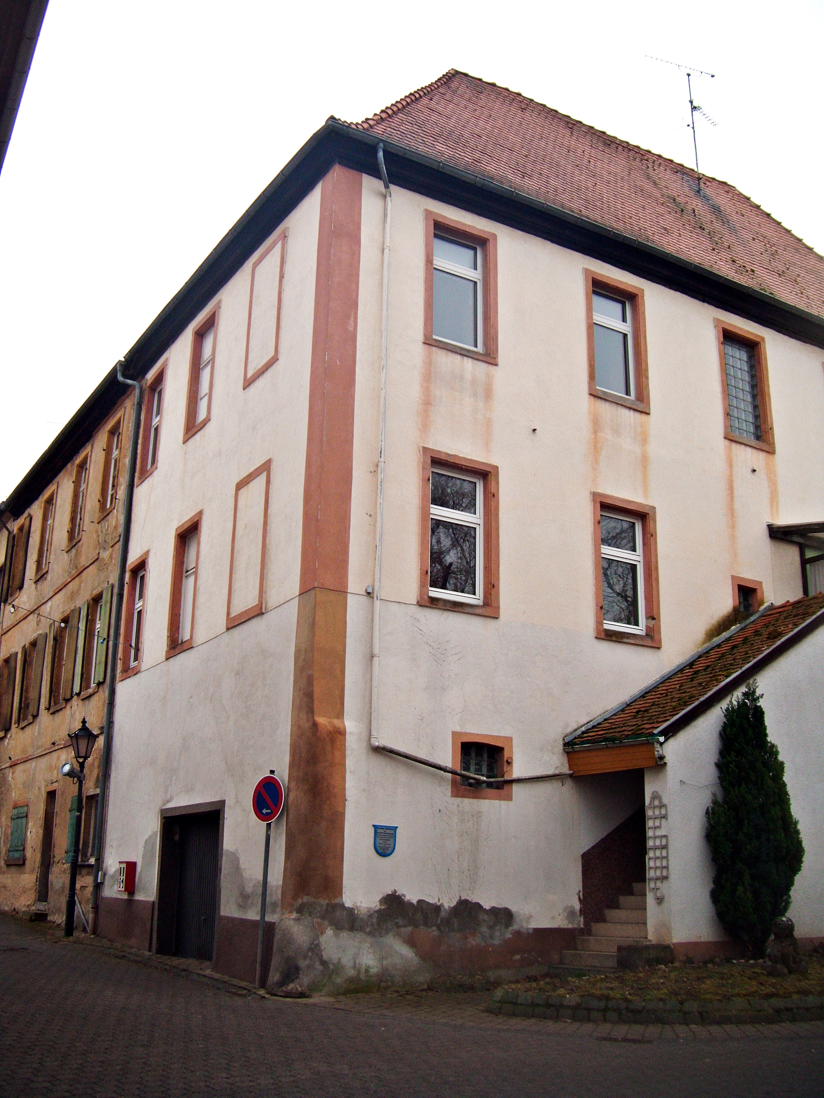 Oberflörsheim Deutschordens-Schaffnerei